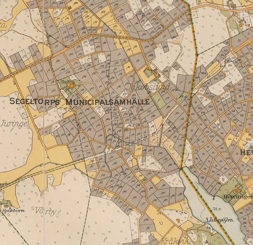 Del av 1934 års karta över Stockholm med omgivningar med Segeltorps Municipalsamhälle